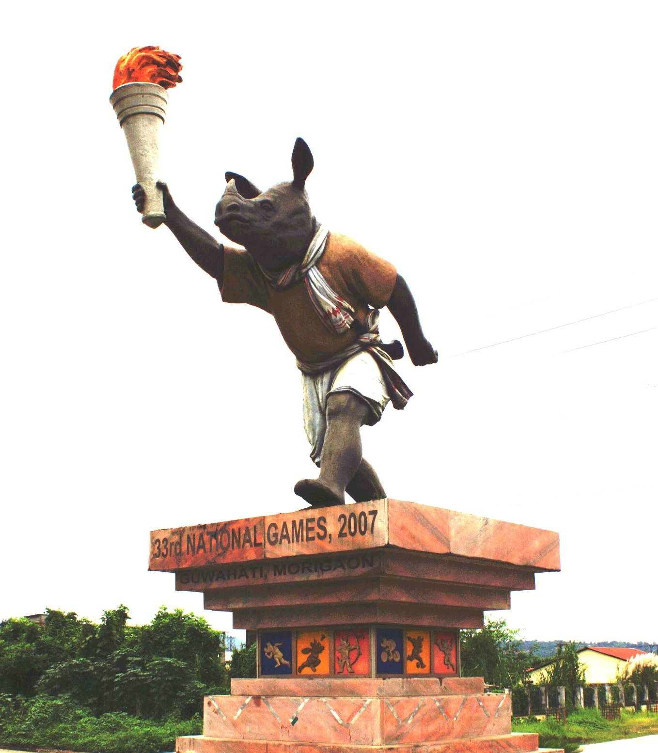 অসমীয়া: গুৱাহাটীৰ সৰুসজাই ষ্টেডিয়ামত ৩৩তম ৰাষ্ট্রীয় ক্রীড়া সমাৰোহৰ মাচকট ‘ৰংমন’।